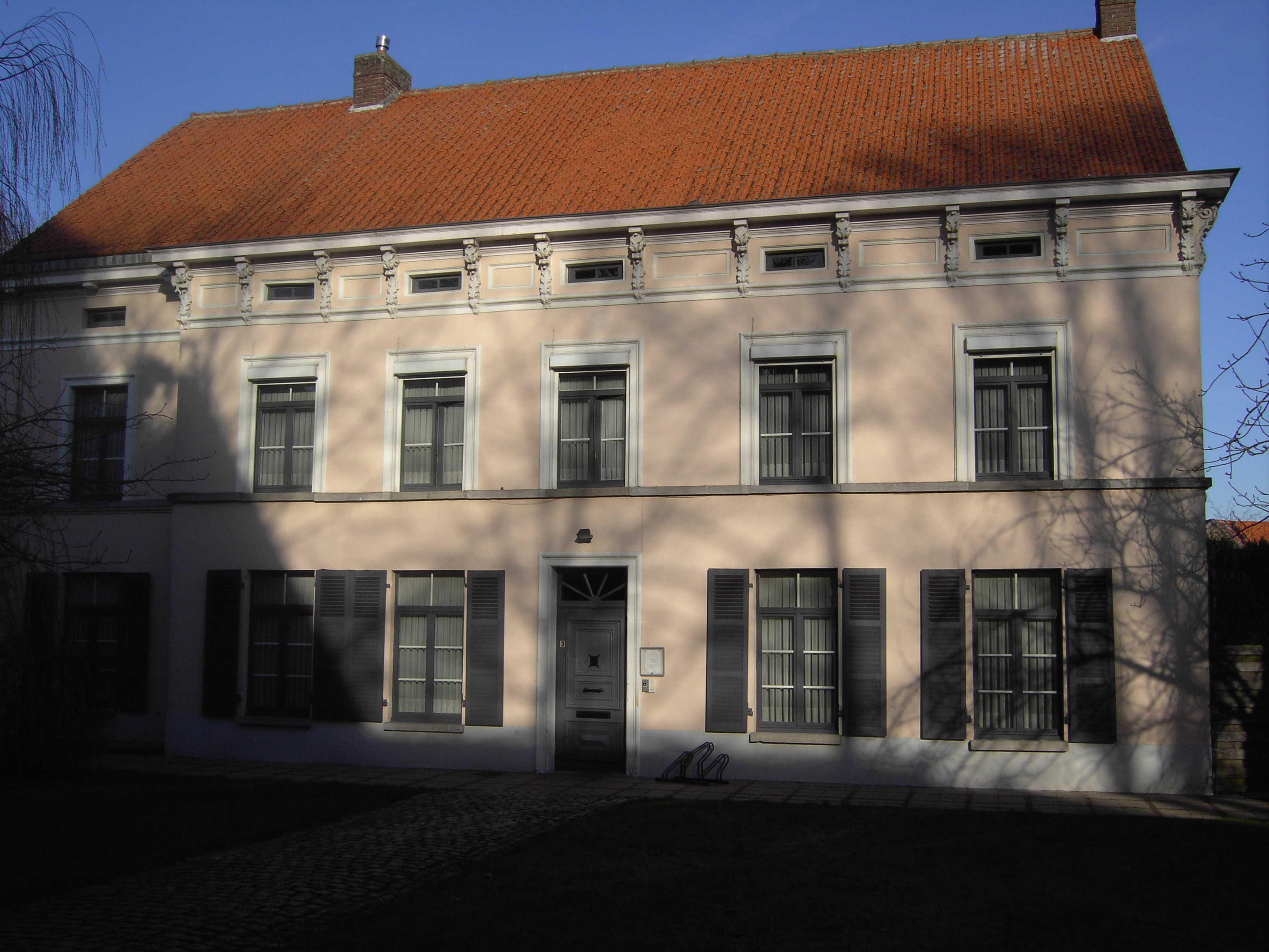 Maldegem, Deken De Fonteynestraat 3. Dekenij/pastorie van de Sint-Barbaraparochie